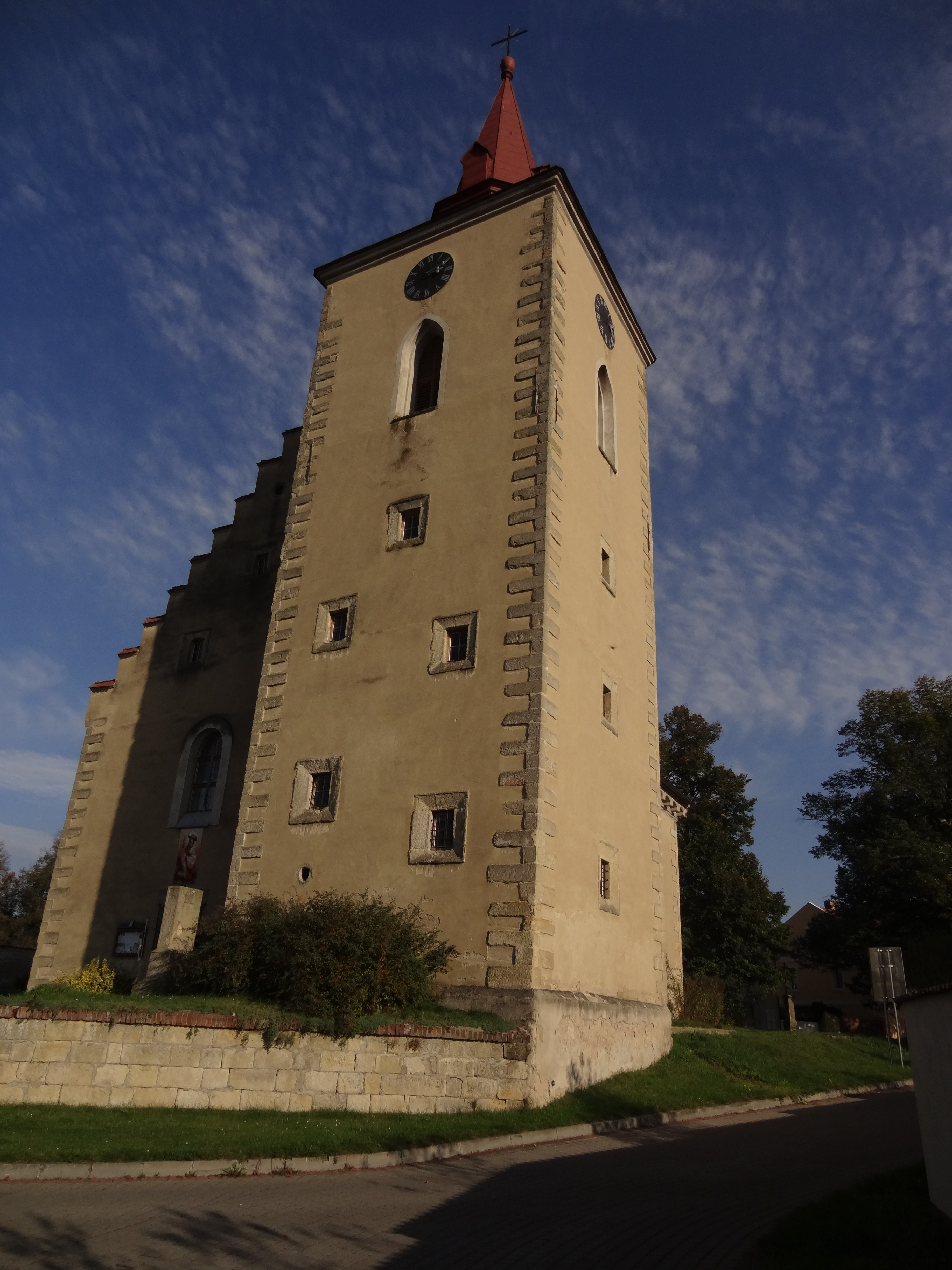 Kostel svatého Bartoloměje, Mírové náměstí, Bakov nad Jizerou.